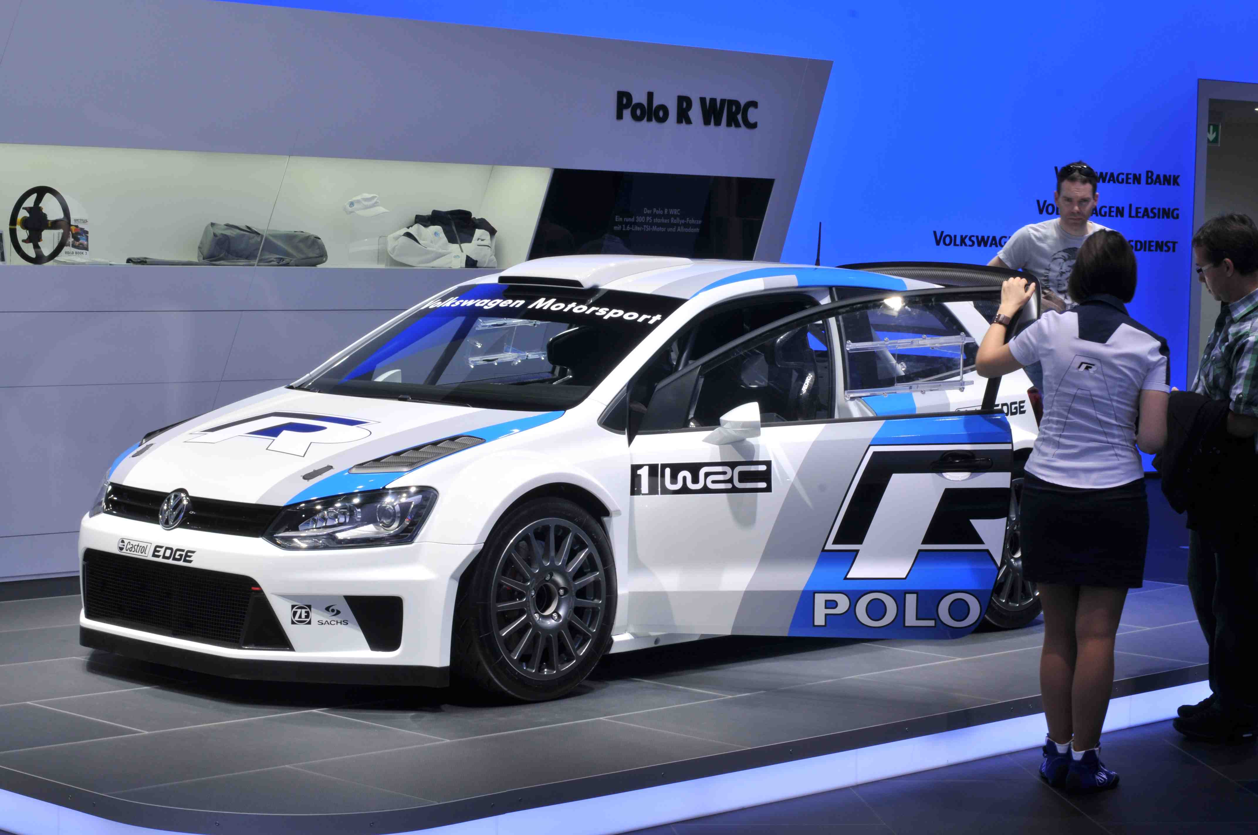 IAA 2011 - Internationale Automobilausstellung in Frankfurt/Main